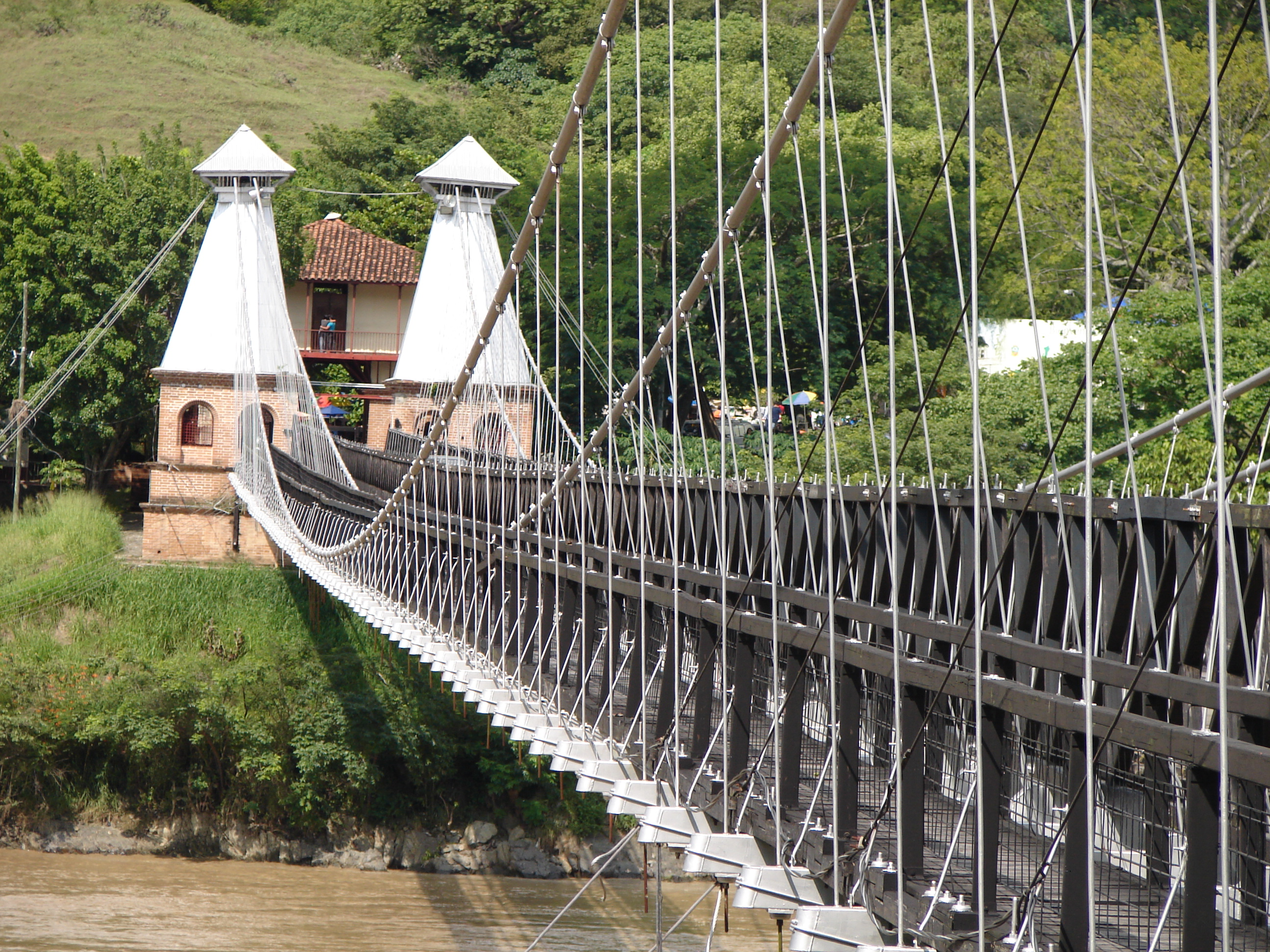 puente de occidente en santa fe de antioquia. Vista lateral